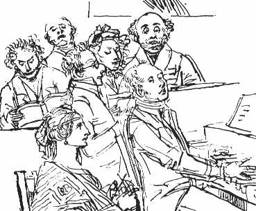 Gäste des literarischen Salons von Henriette Herz. Zeichnung von J. G. Schadow, etwa 1800, am Klavier Abraham Mendelssohn